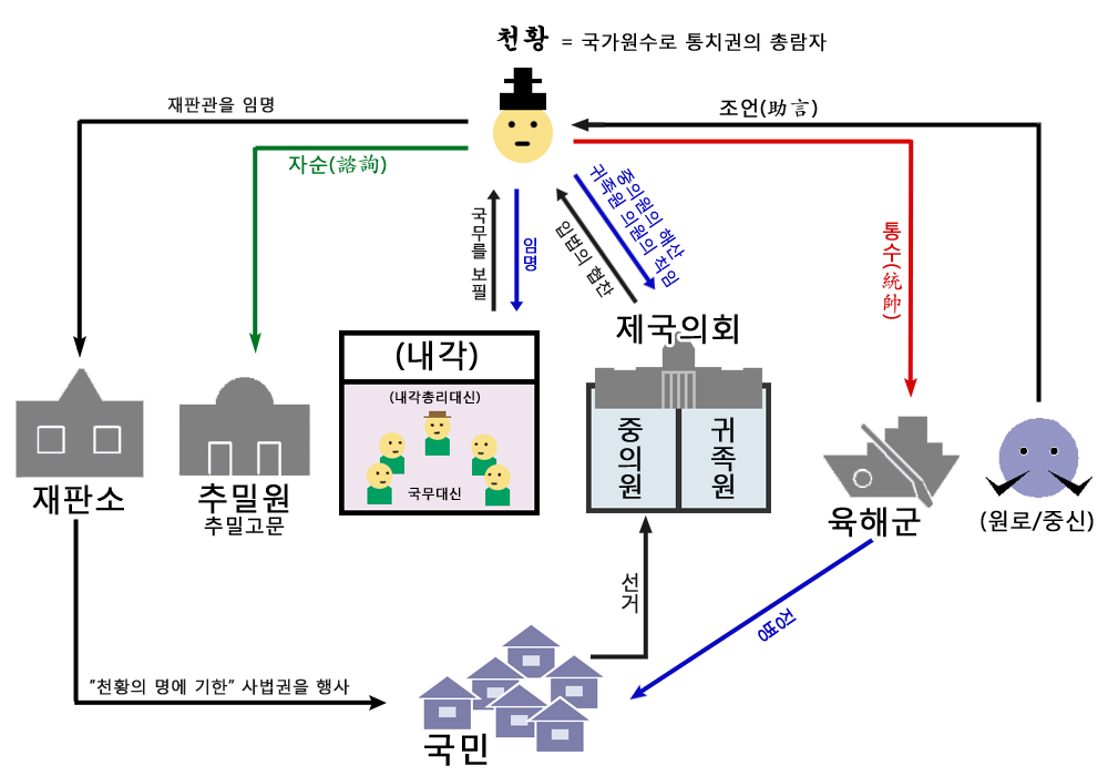 메이지헌법기의 통치구조